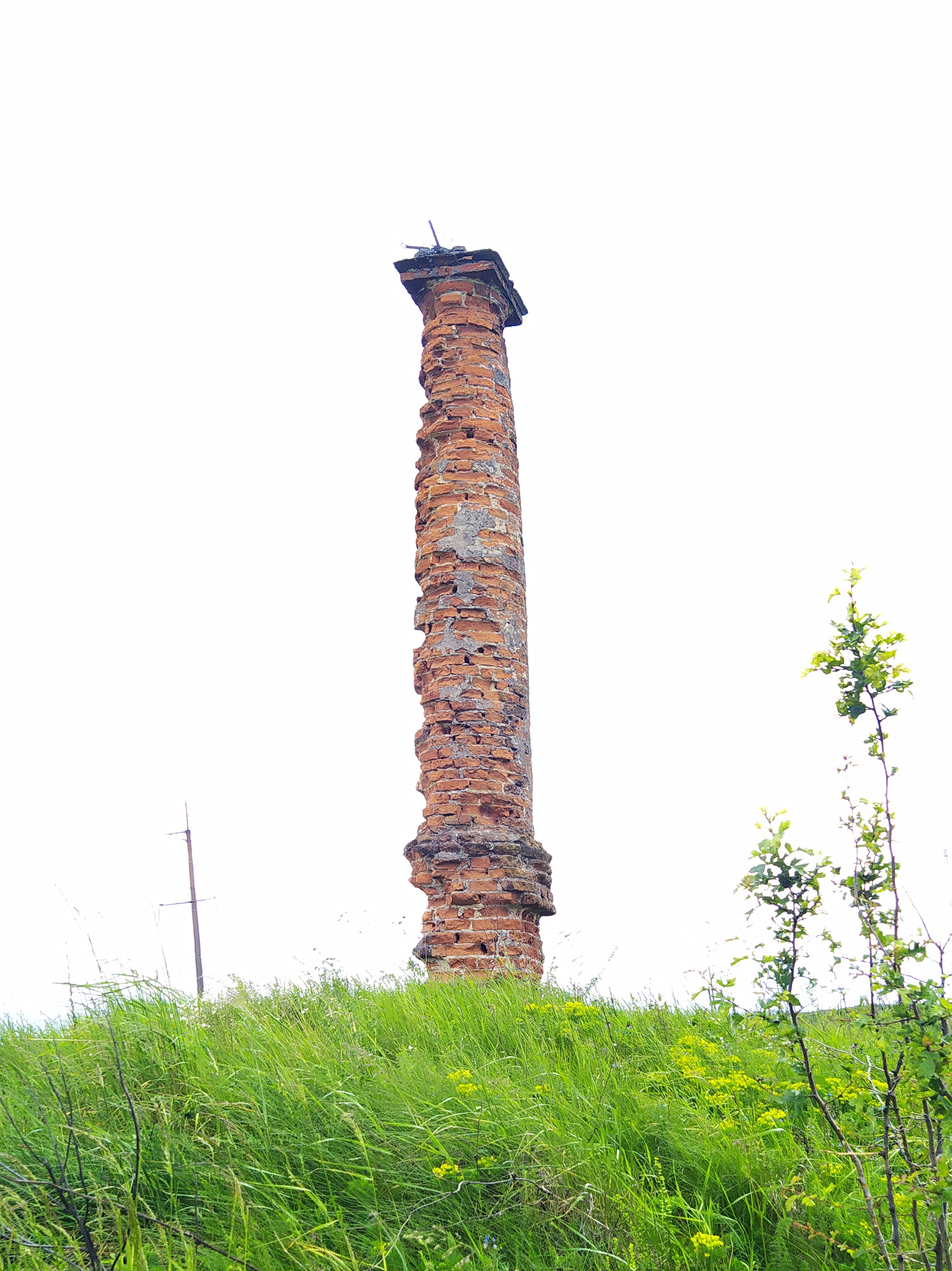 Пам'ятна колона полеглим у боротьбі з татарами 1672 р. в селі Градівка, що на 6 км. на північ від Рудок